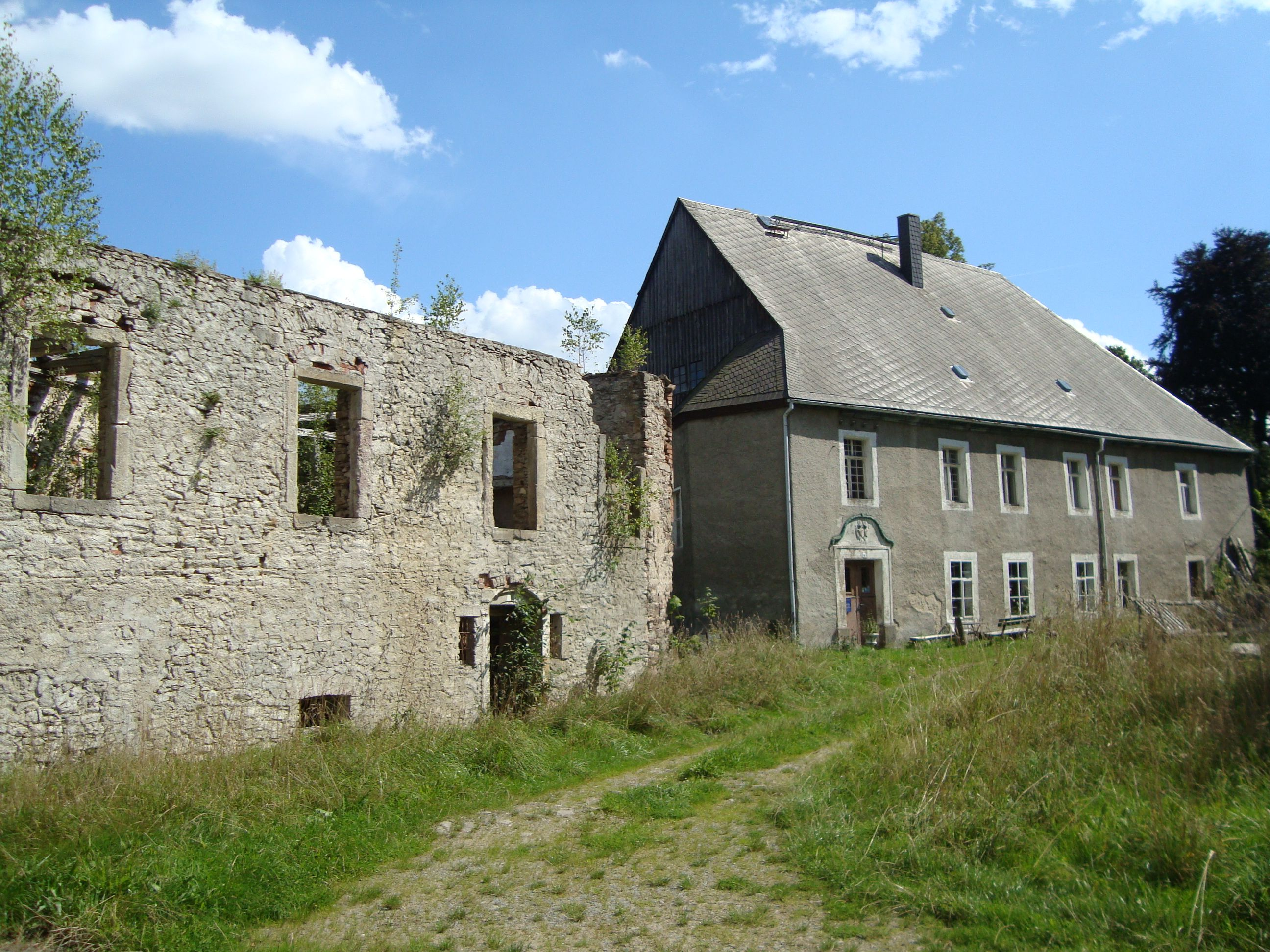 Ehemaliges Rittergut in Dorfchemnitz im Erzgebirge